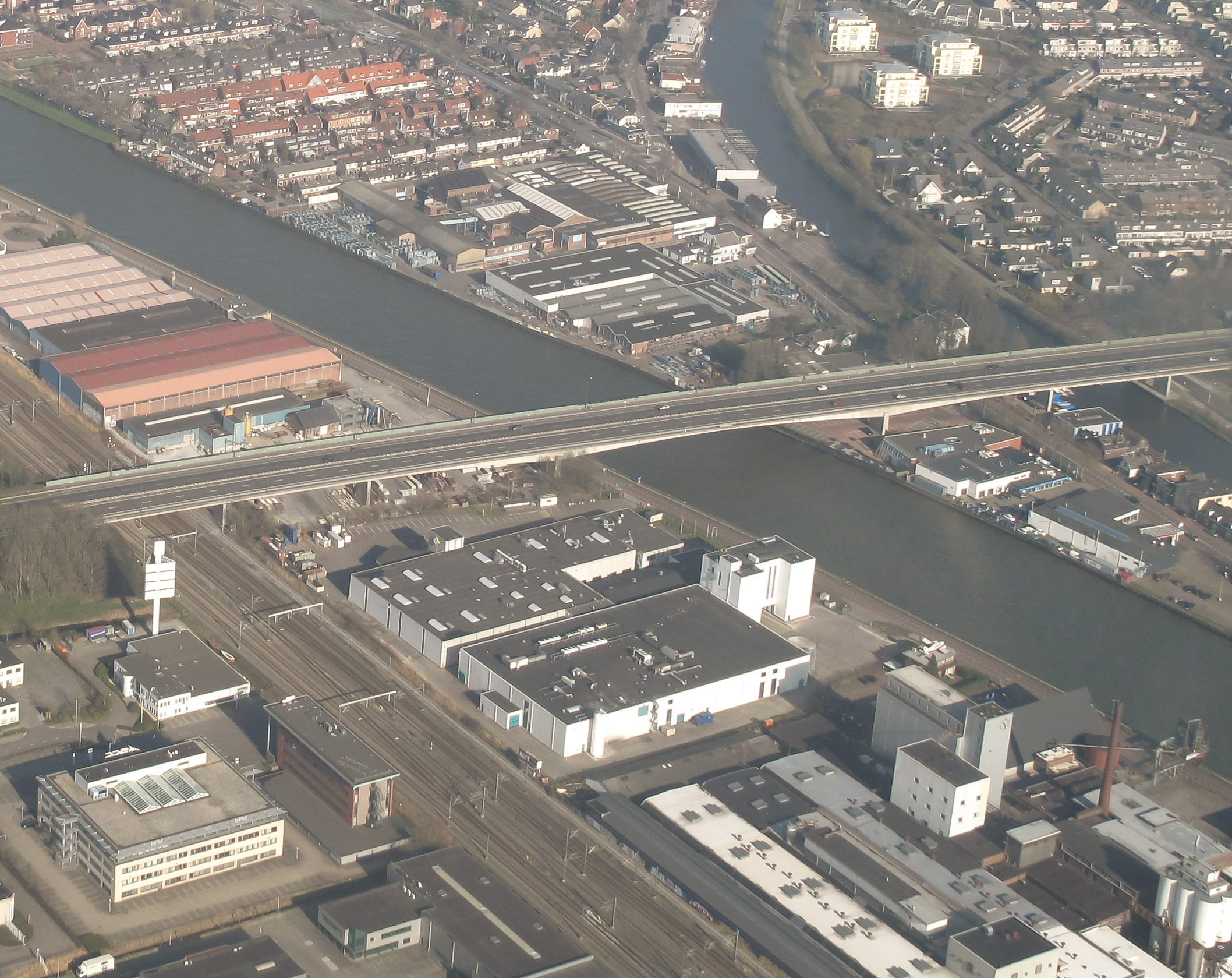 Friezenbuurt linksboven, UTD rechtsonder. In het midden van de foto de Zuilensebrug over het Amsterdam-Rijnkanaal op de grens van Utrecht en Maarssen